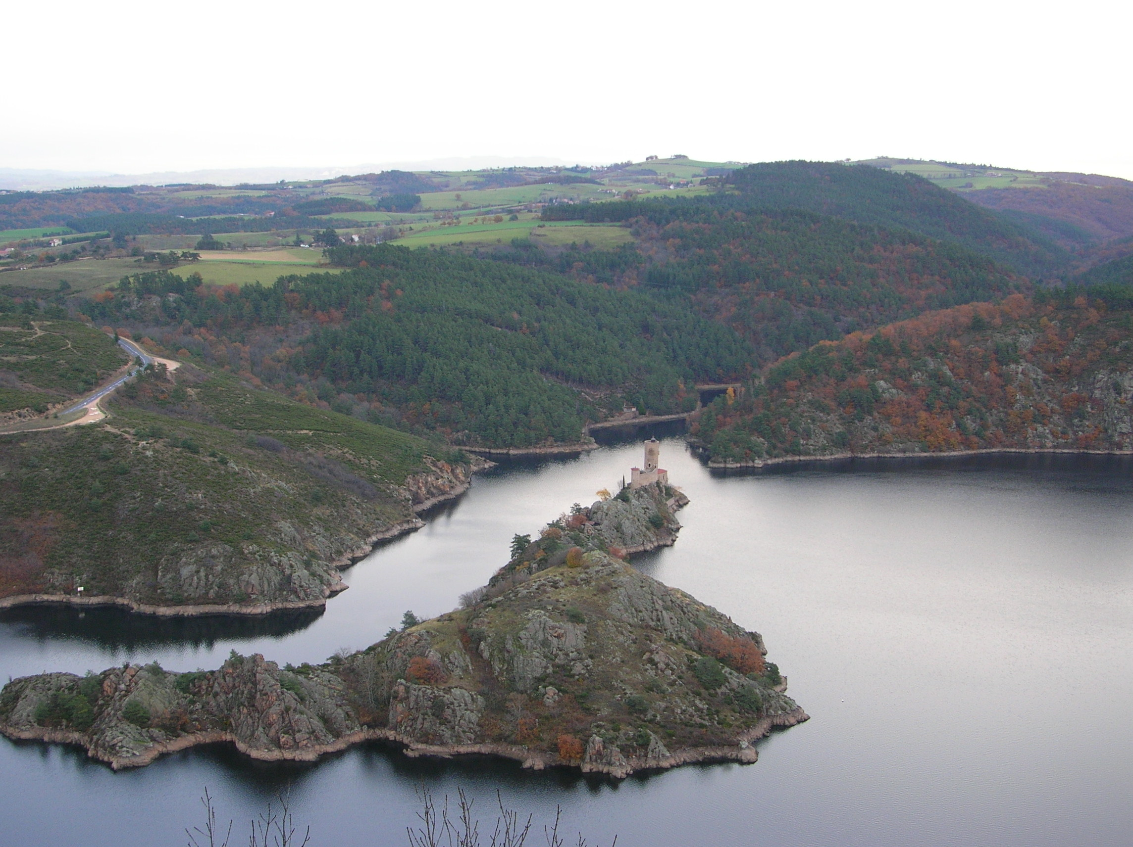 Les gorges de la Loire près de Chambles